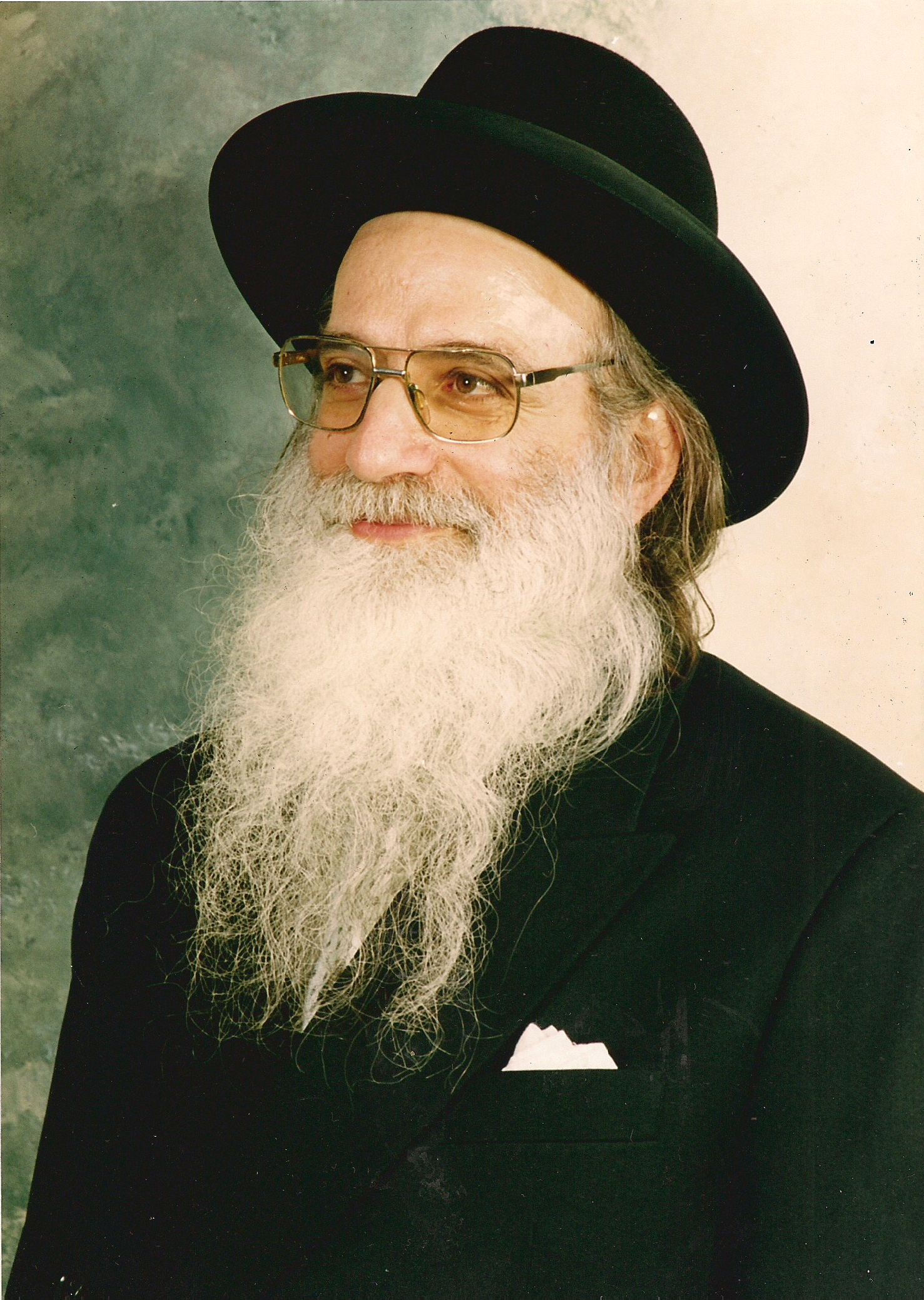 דוד שפס